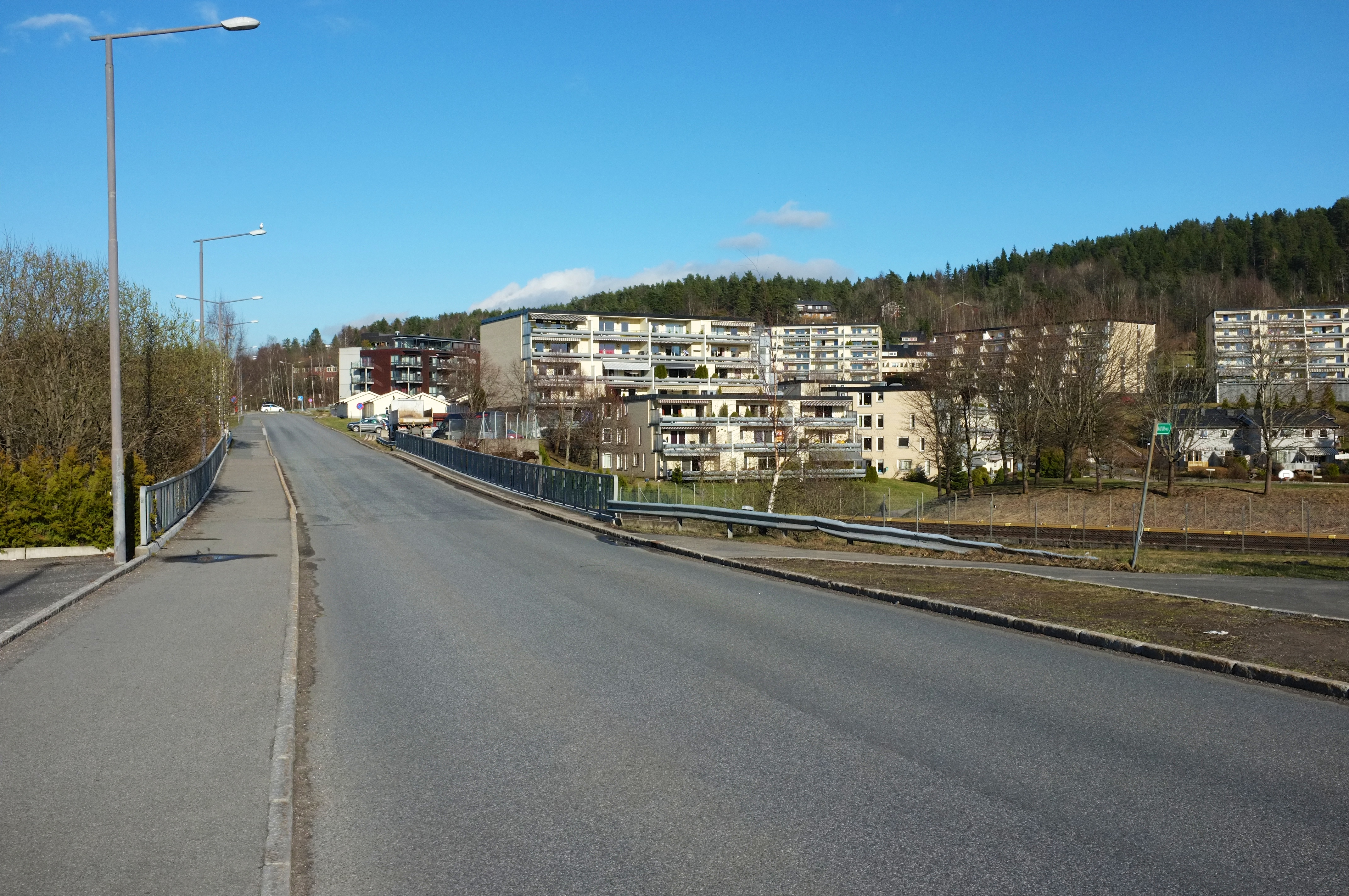 Jerikoveien i Oslo.